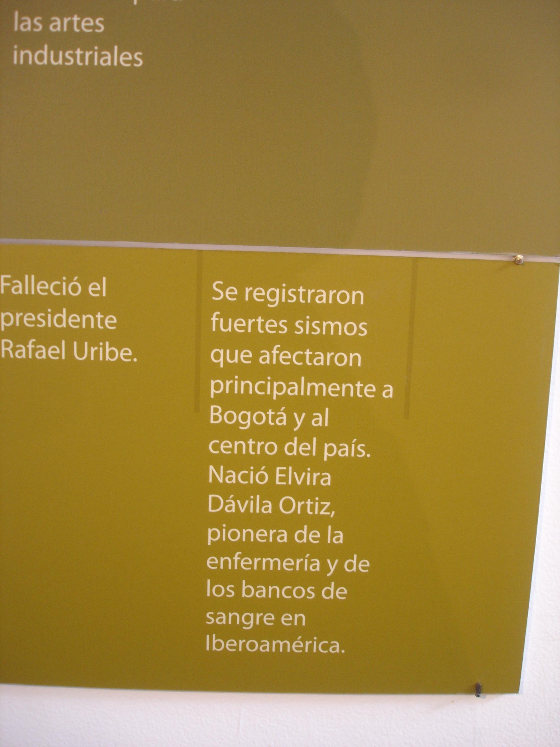 Imágen registrada en 20 de julio de 2008 en el MamBo